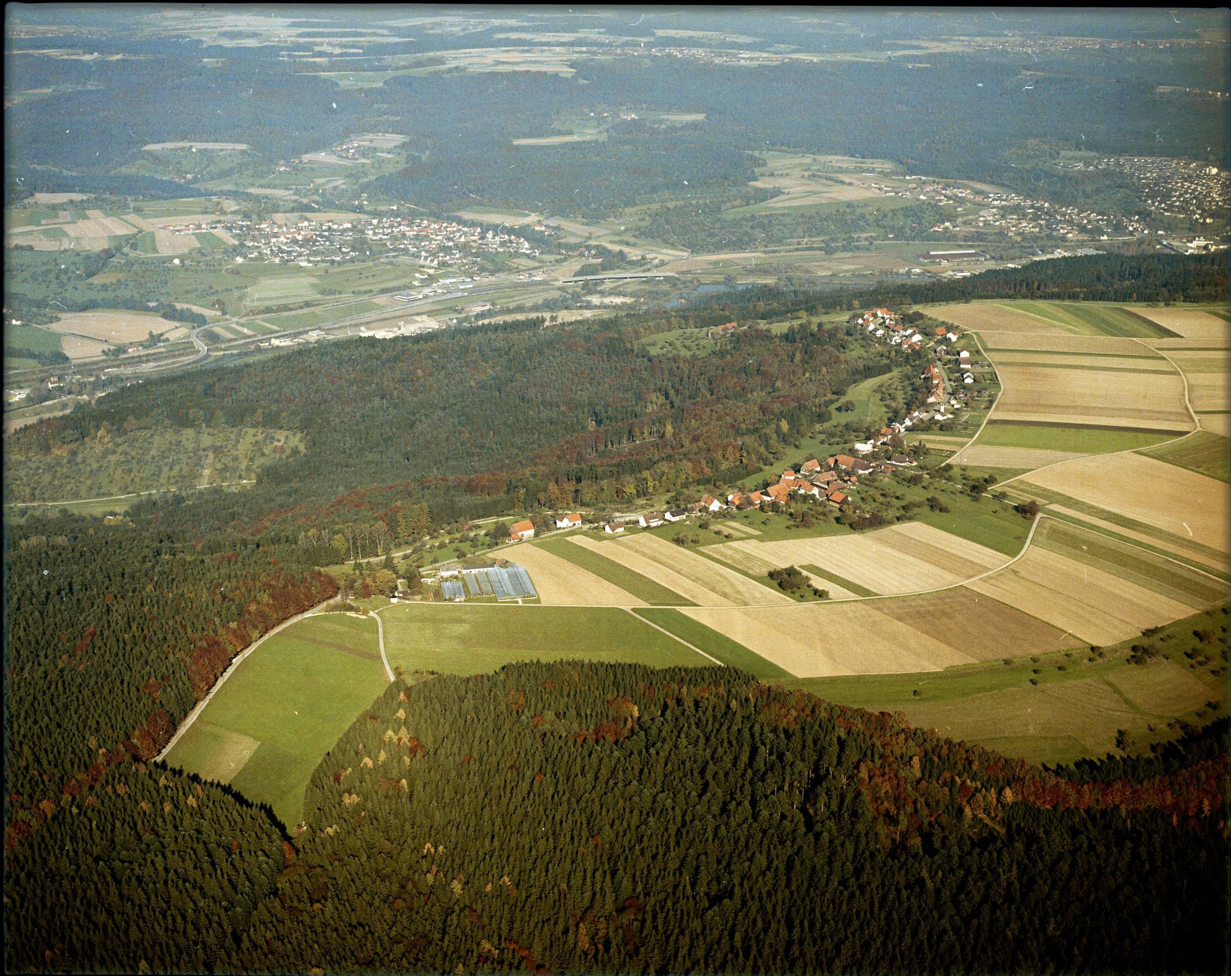 Luftbild von Rattenharz - Staatsarchiv Sigmaringen - Archivalieneinheit N 1/96 T 1 Nr. 591